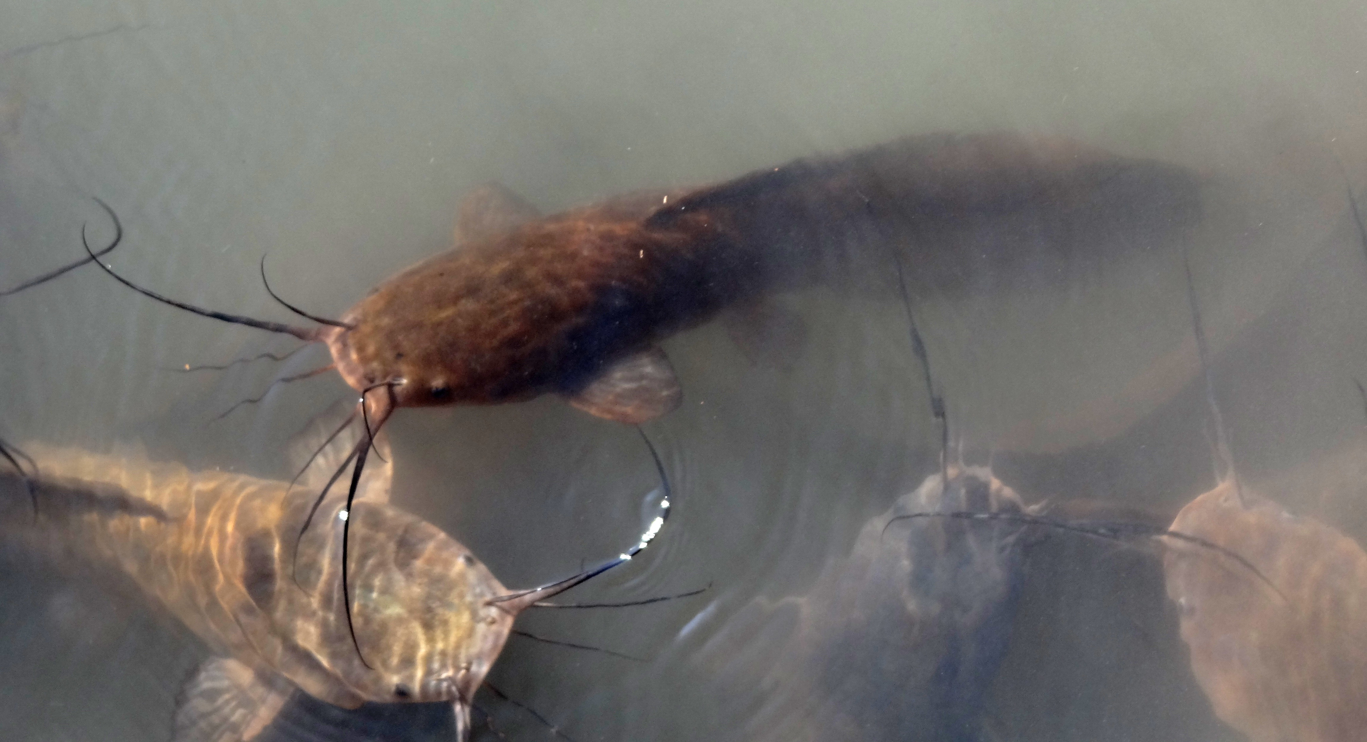 שפמנון בעין אפק